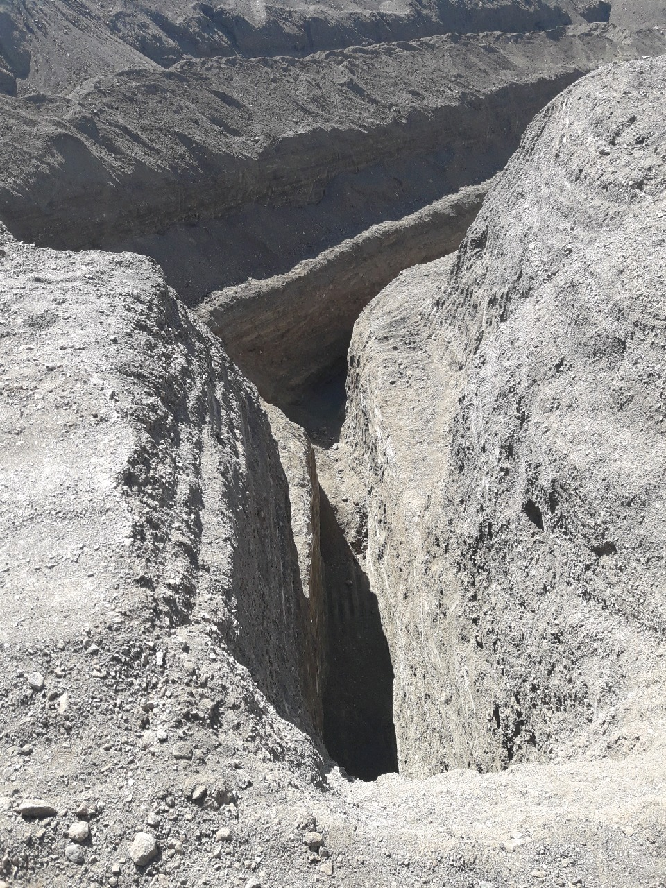 مرمت و بهسازی قنات روستای فریز در مرداد ماه 1398